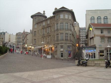 Biarritz våren 2007